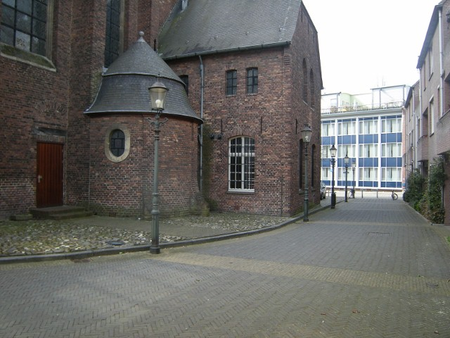 Doopkapel Jongerenkerk Venlo